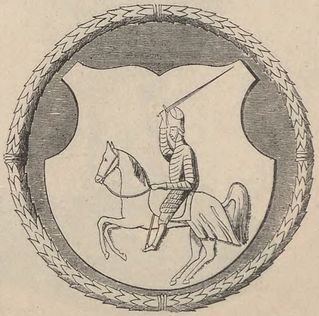 Беларуская (тарашкевіца): Надмагільле Зьмітра Сангушкі (Źmicier Sanguška) з гербам «Пагоня» («Pahonia»)